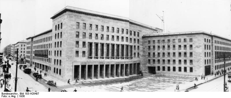 Zentralbild Berlin 1936 Das Reichsluftfahrtministerium in der Wilhelmstraße (links) Ecke Leipzigerstraße. (vorn) B034-35